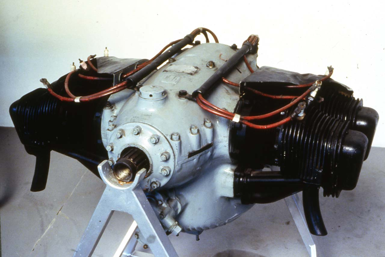 Motore a 4 cilindri orizzontali contrapposti, raffreddato ad aria. I cilindri presentano un'ampia alettatura sulla superficie esterna. La distribuzione di carburante è regolata da due valvole in testa per cilindro, azionate ad aste e bilancieri posti sul lato inferiore dei cilindri. Il sistema di alimentazione comprende un carburatore aspirato, non presente. Ogni cilindro dispone di due candele di accensione, alimentate da due magneti posti sul retro del motore. Il carter presenta una verniciatura di colore azzurro chiaro, mentre i cilindri sono verniciati di nero. Notizie storico-critiche L'utilizzo di motori aeronautici a cilindri orizzontali contrapposti venne introdotto nel 1931 negli Stati Uniti. Progressivamente, i propulsori a 4 o 6 cilindri orizzontali raffreddati ad aria si imposero sul mercato mondiale per motorizzazioni con potenza inferiore ai 400 cavalli tanto da essere gli unici motori alternativi a rimanere in servizio anche dopo la comparsa dei motori a reazione. Questa tipologia di motori, dalla grande affidabilità e dalle ottime prestazioni, si sono dimostrati particolarmente adatti allìaviazione civile di piccole dimensioni. Questo modello di propulsori prodotto dalla Lycoming, divisione della Aviation Corporation, equipaggiò aeroplani leggeri come il l'AVIA FL 3 e il Macchi MB 308.